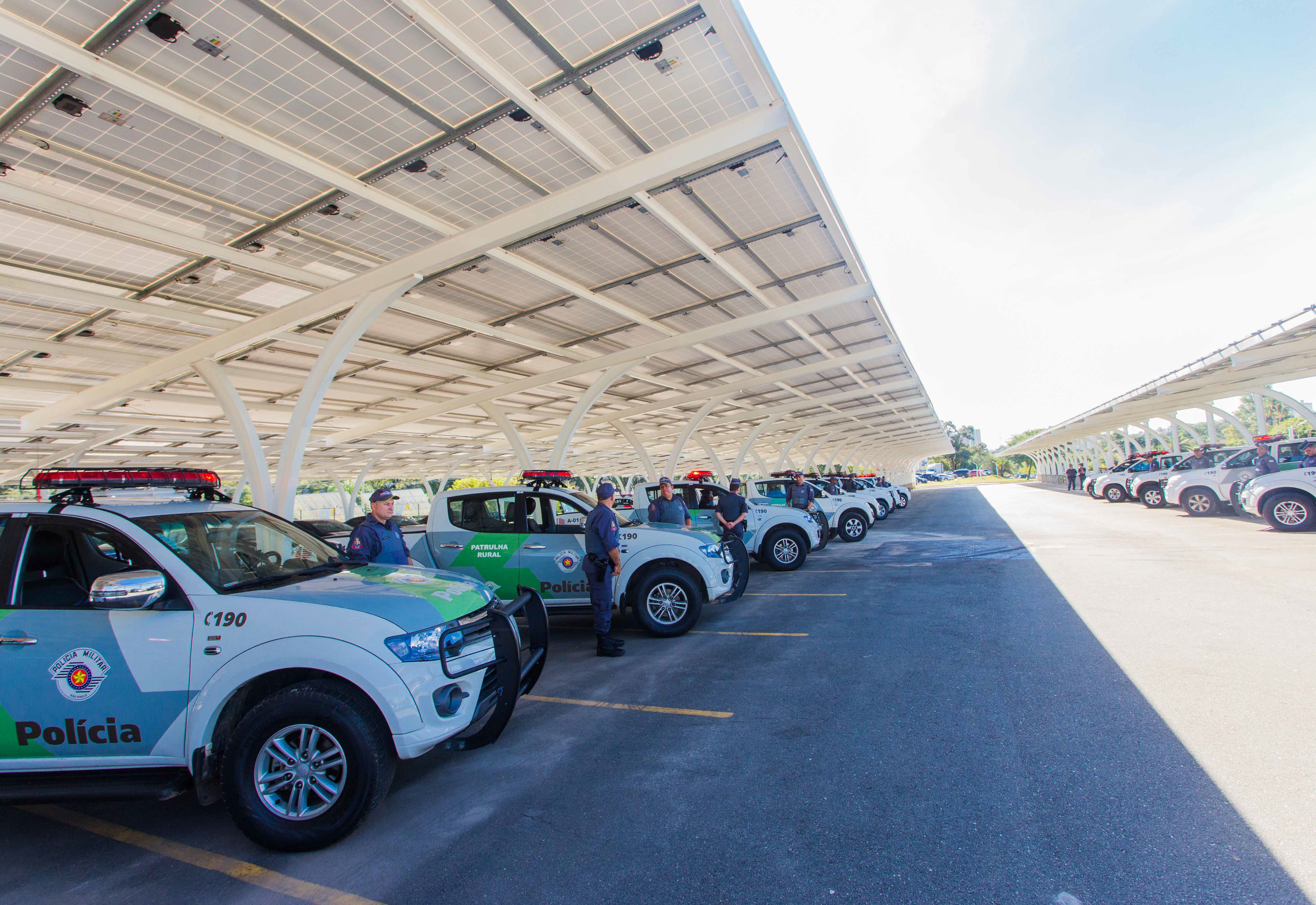 O Governador do Estado de São Paulo Geraldo Alckmin, participou da Assinatura do Dejem Ambiental+Início de Operação das Placas Fotovoltaicas do Parque Villa Lobos. Local: São Paulo/SP. Data: 26/05/2017. Foto: Alexandre Carvalho/A2img